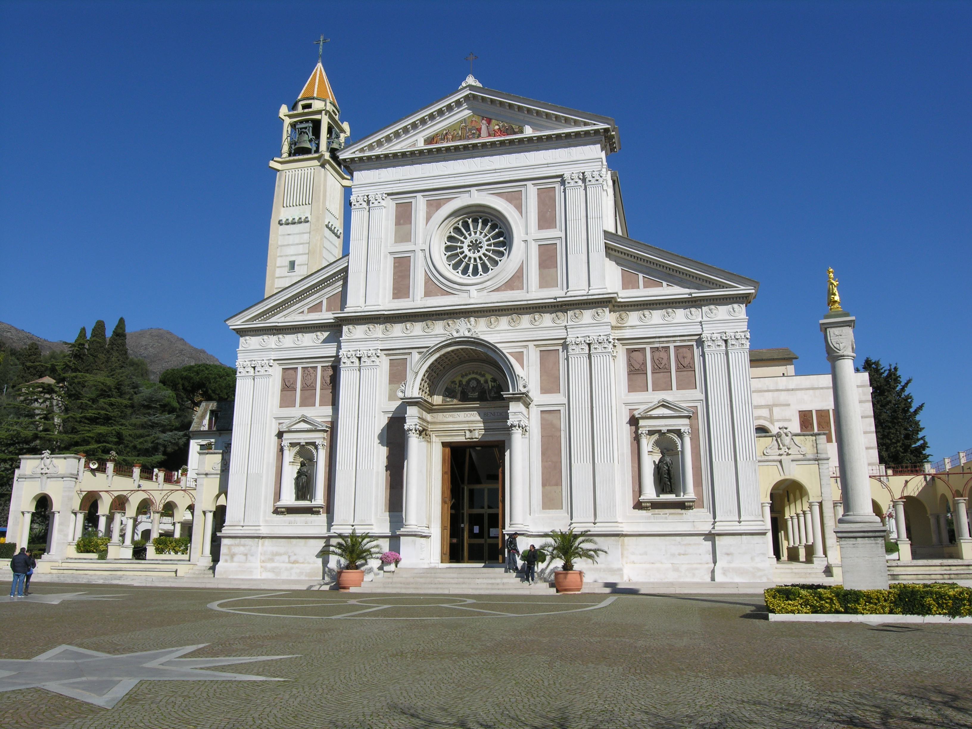 Santuario Gesù Bambino di Praga, Arenzano (SV)